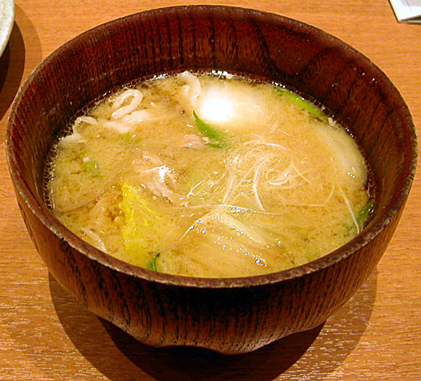 撮影者：小太刀 豚汁 矢場とん の 矢場とん汁(Tonjiru)です。